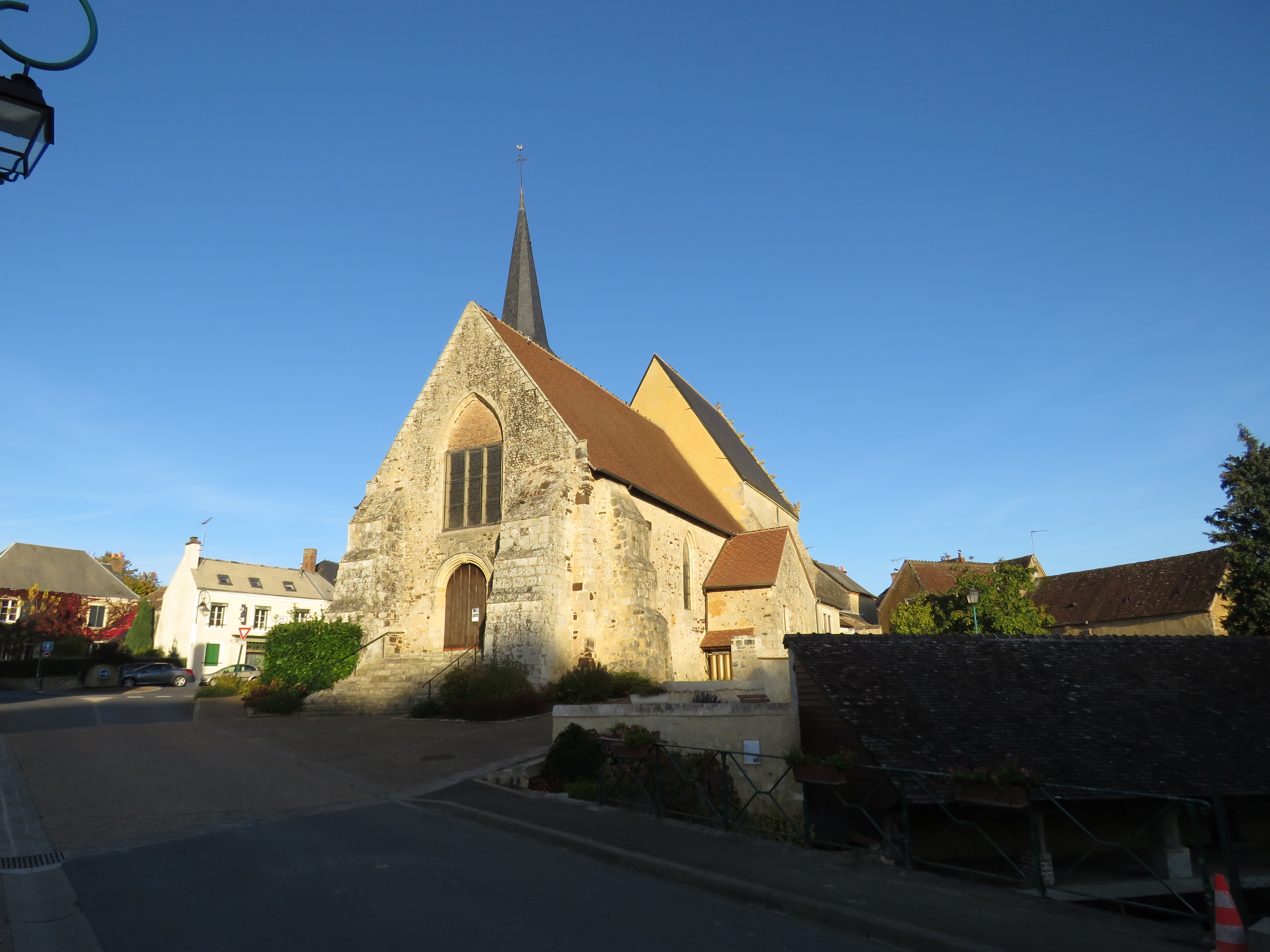 Eglise